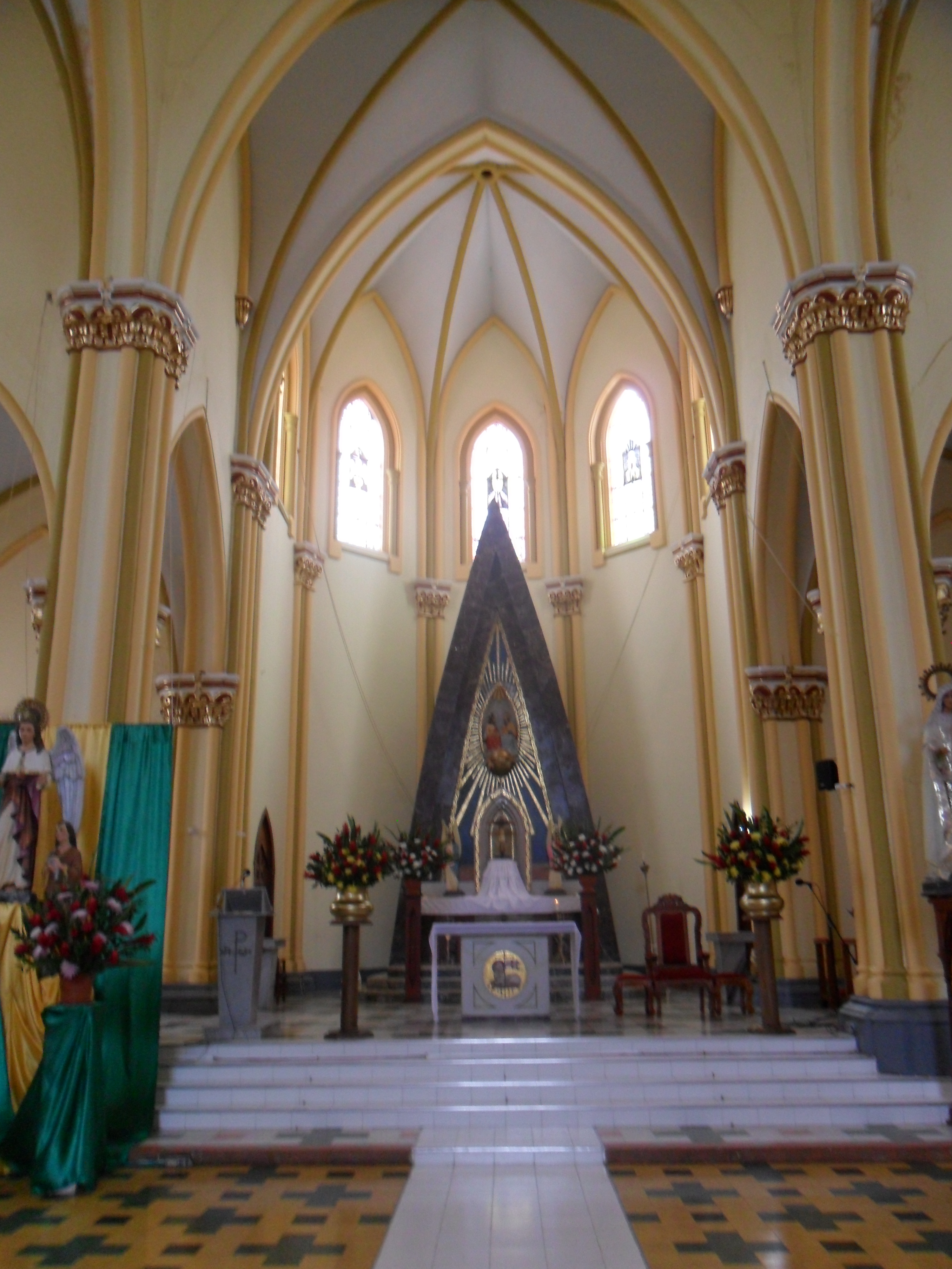 Vista del altar de la Iglesia de San Rafael de Betania.